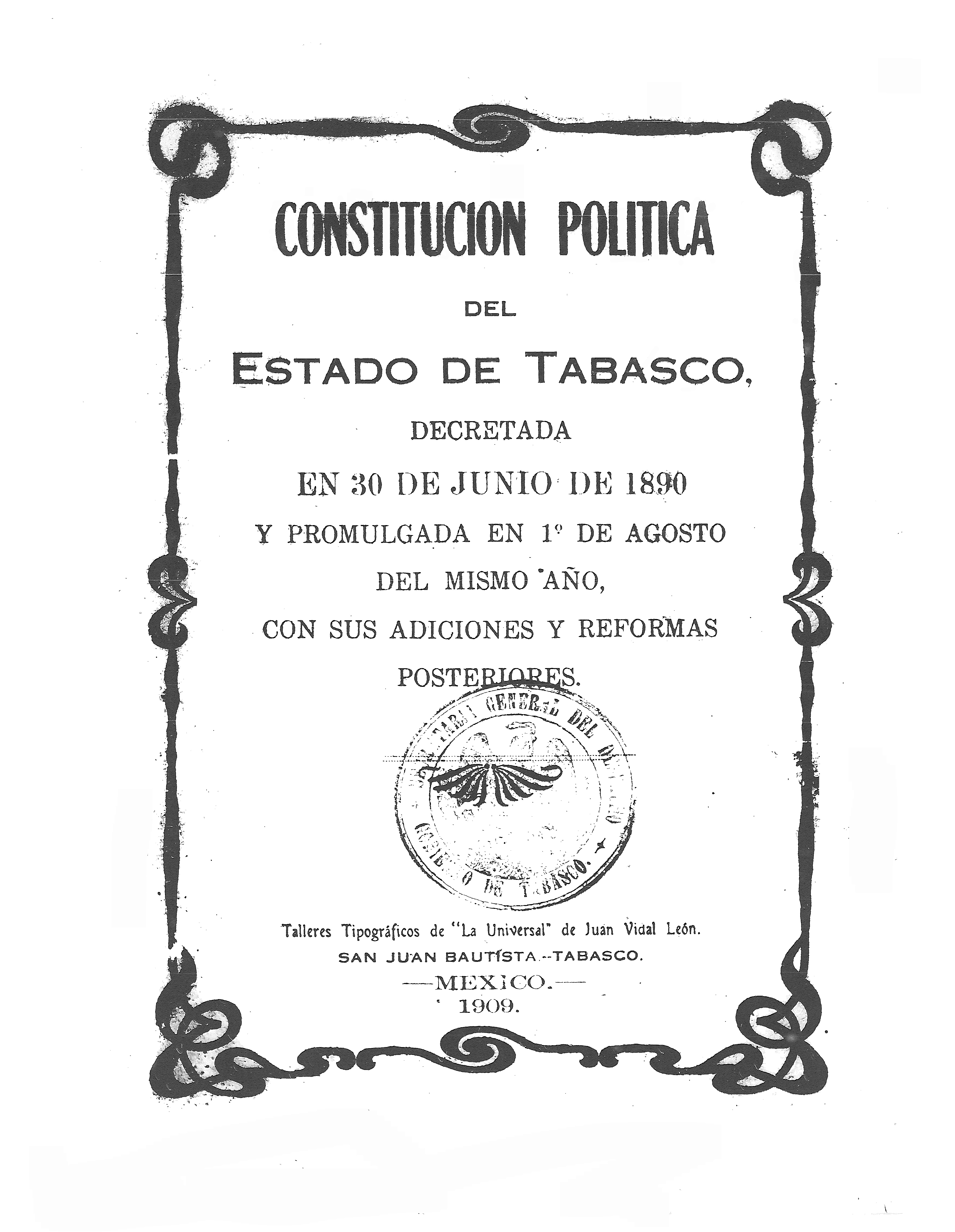 Portada de la sexta Constitución del Estado de Tabasco, decretada el 30 de junio de 1890. y promulgada el 1 de agosto del mismo año por el gobernador Simón Sarlat Nova.